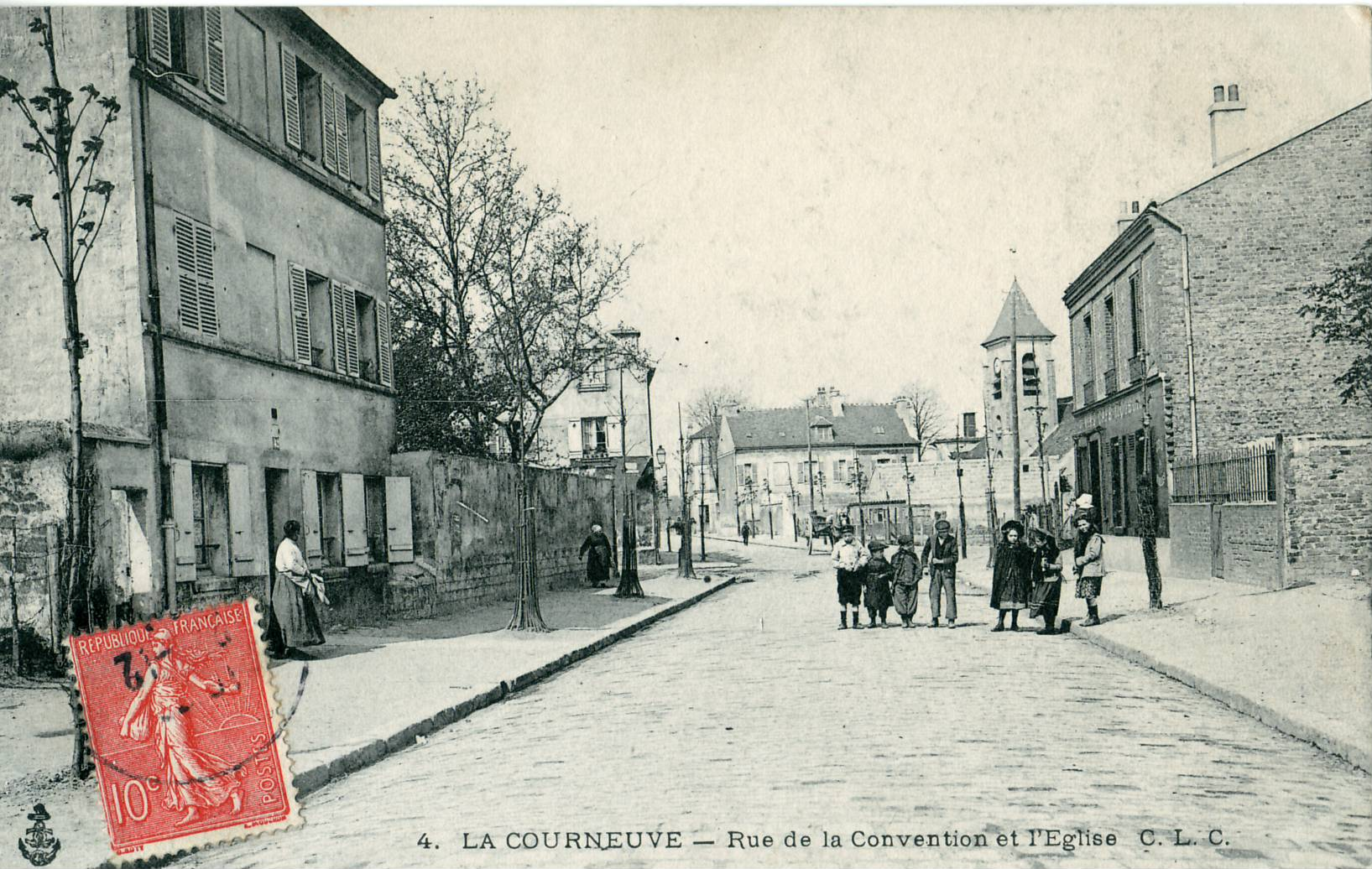 Carte postale ancienne éditée par CLC, N° 4LA COURNEUVE : Rue de la Convention et l'église